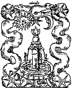 玫瑰園圖·第一象